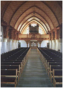 Organ - kostol sv. Anny